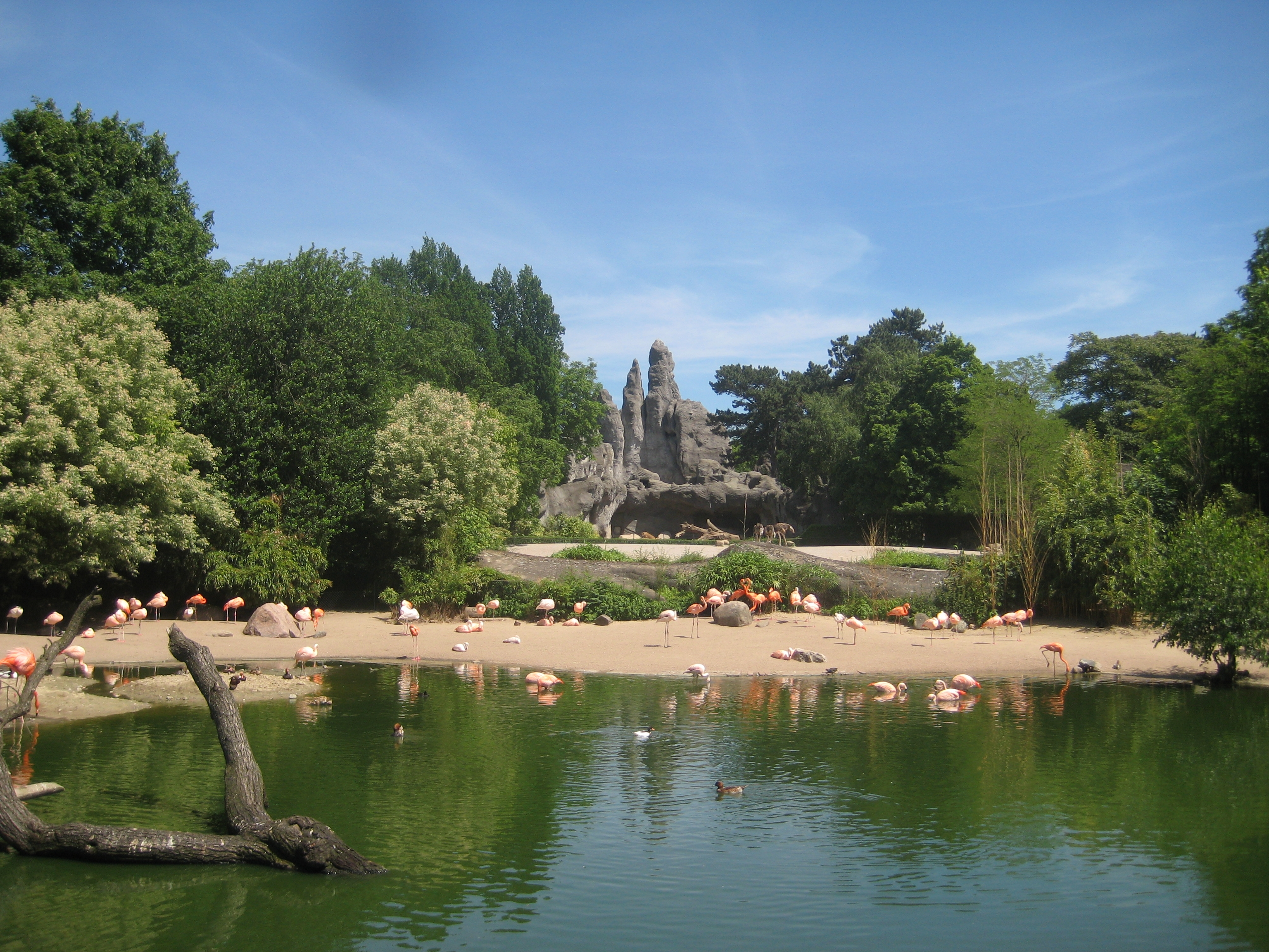 Im Tierpark Hagenbeck 2012